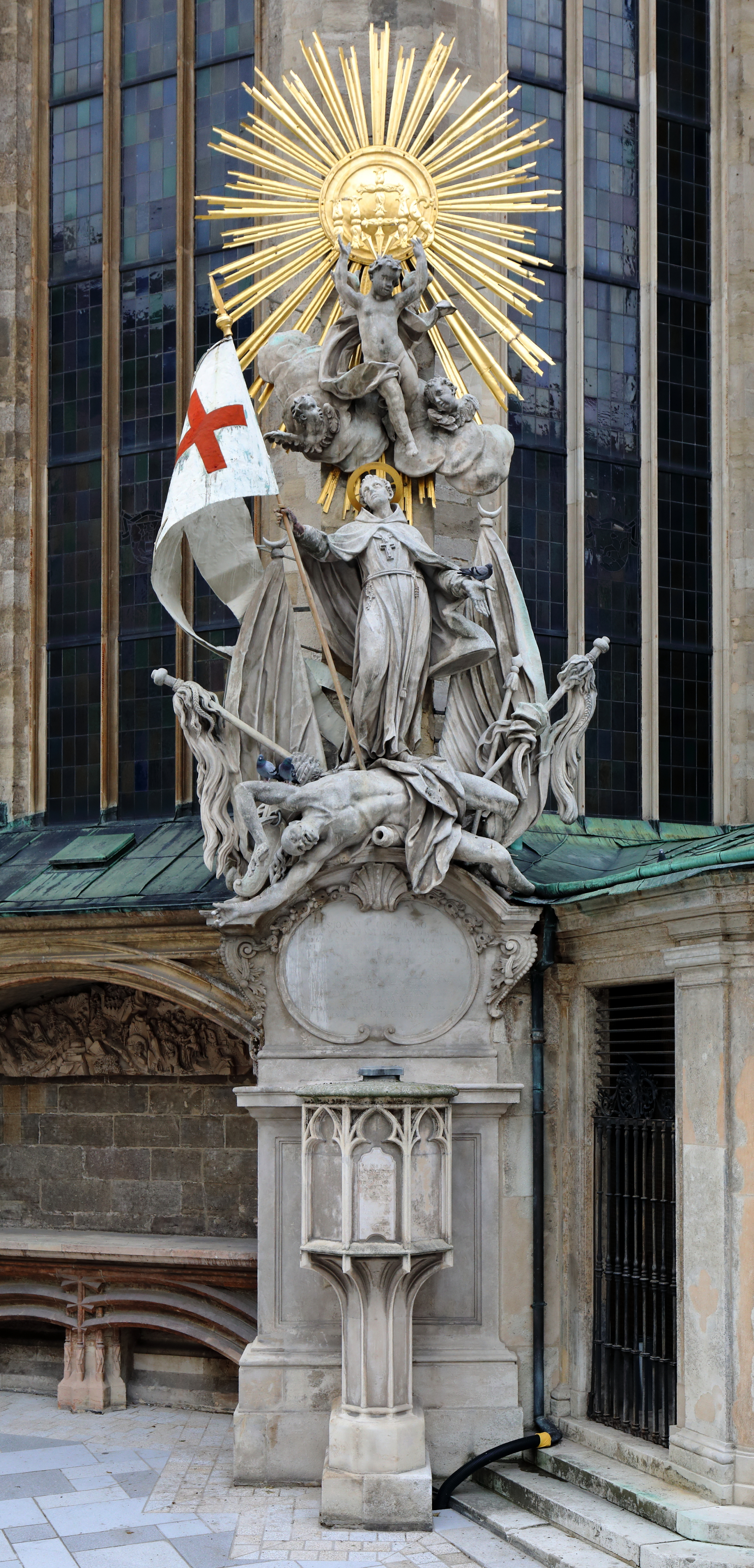 Die Capistrankanzel beim Stephansdom in der österreichischen Bundeshauptstadt Wien.Die Capistrankanzel ist ein Denkmal zu Ehren des heiligen Franziskanermönches Johannes Capistranus und befindet sich nordseitig an der Außenmauer des Albertinischen Chores. Es besteht aus einer Kanzel und einer Monumentalgruppe. Von der Kanzel predigte Capistran und sie stand ab etwa 1430 vermutlich inmitten des Stephansfriedhofes. Ursprünglich war sie ein Schnitzwerk aus Eichenholz. Später in Stein nachgebildet, wurde sie mit Auflassung des Friedhofs um 1735 dicht an den Dom versetzt und 1737/38 zu einem Teil eines Denkmals umgeformt, indem sie um eine figurale Gruppe erweitert wurde. Diese wurde von dem Bildhauer Johann Joseph Resler nach einem Entwurf des Malers François Roettiers errichtet.